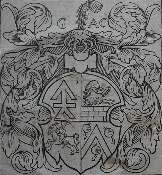 Беларуская (тарашкевіца): Герб Рыгора Хадкевіча (Ryhor Chadkievič) з Пагоняй (Pahonia)